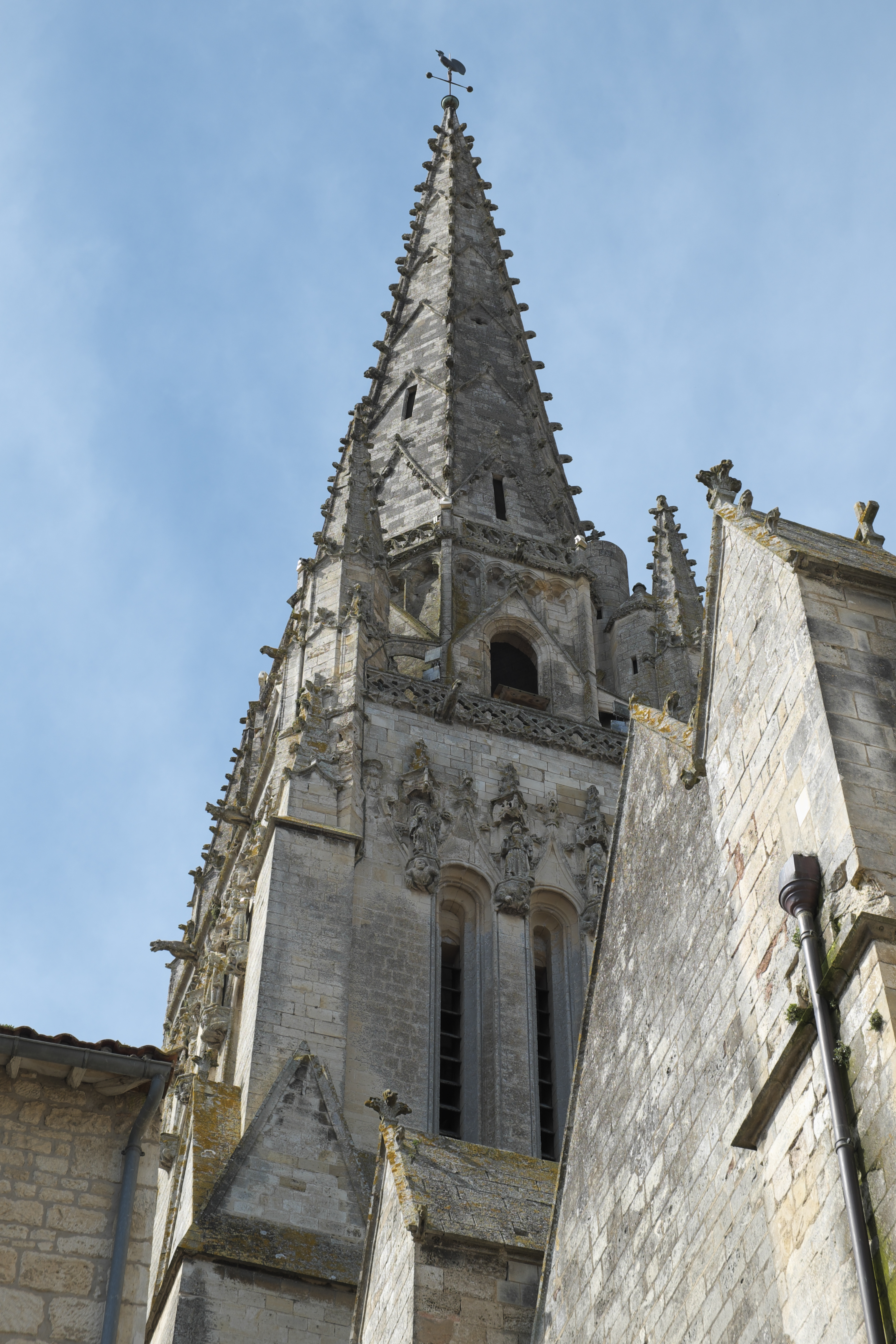 Katholische Pfarrkirche Notre-Dame-de-l’Assomption in Fontenay-le-Comte im Département Vendée (Pays de la Loire/Frankreich)